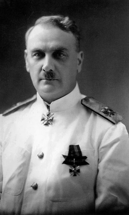 Георгий Карлович Старк (20 октября 1878 Санкт-Петербург — 2 марта 1950) — российский контр-адмирал.